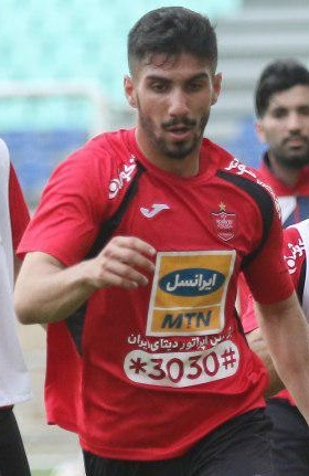 تمرین تیم فوتبال پرسپولیس و تعدادی از بازیکنان این تیم